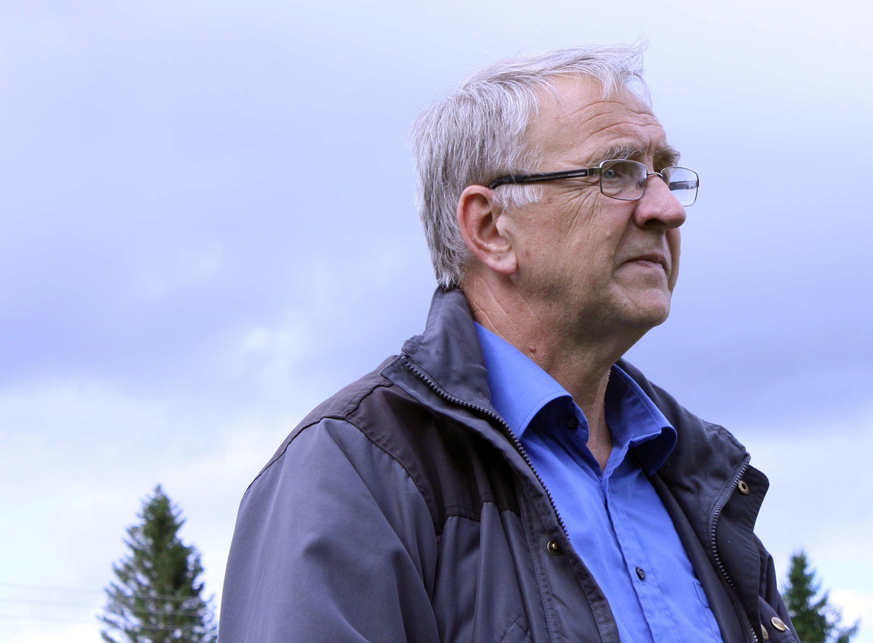 Ordfører Erling Bøhle i Melhus kommune.